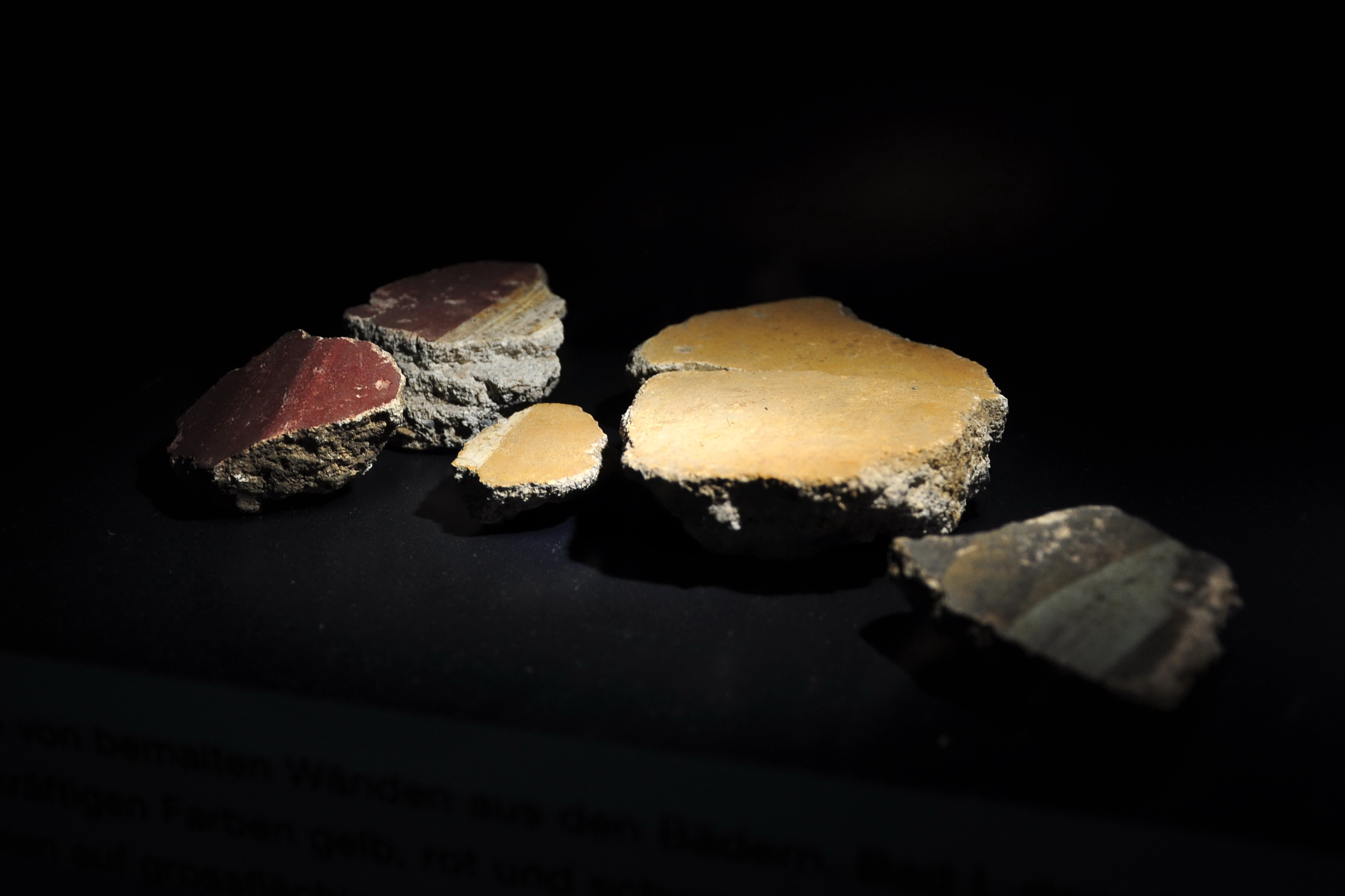 Exponat aus der Thermengasse im einstigen römischen vicus Turicum (Zürich) : Verputzreste von bemalten Wänden aus den Bädern. Bad I, dem Stil des 1. Jahrhundert n. Chr. entsprechend mit kräftigen Farben gelb, rot und schwarz. (gemäß Beschriftung in der Vitrine)